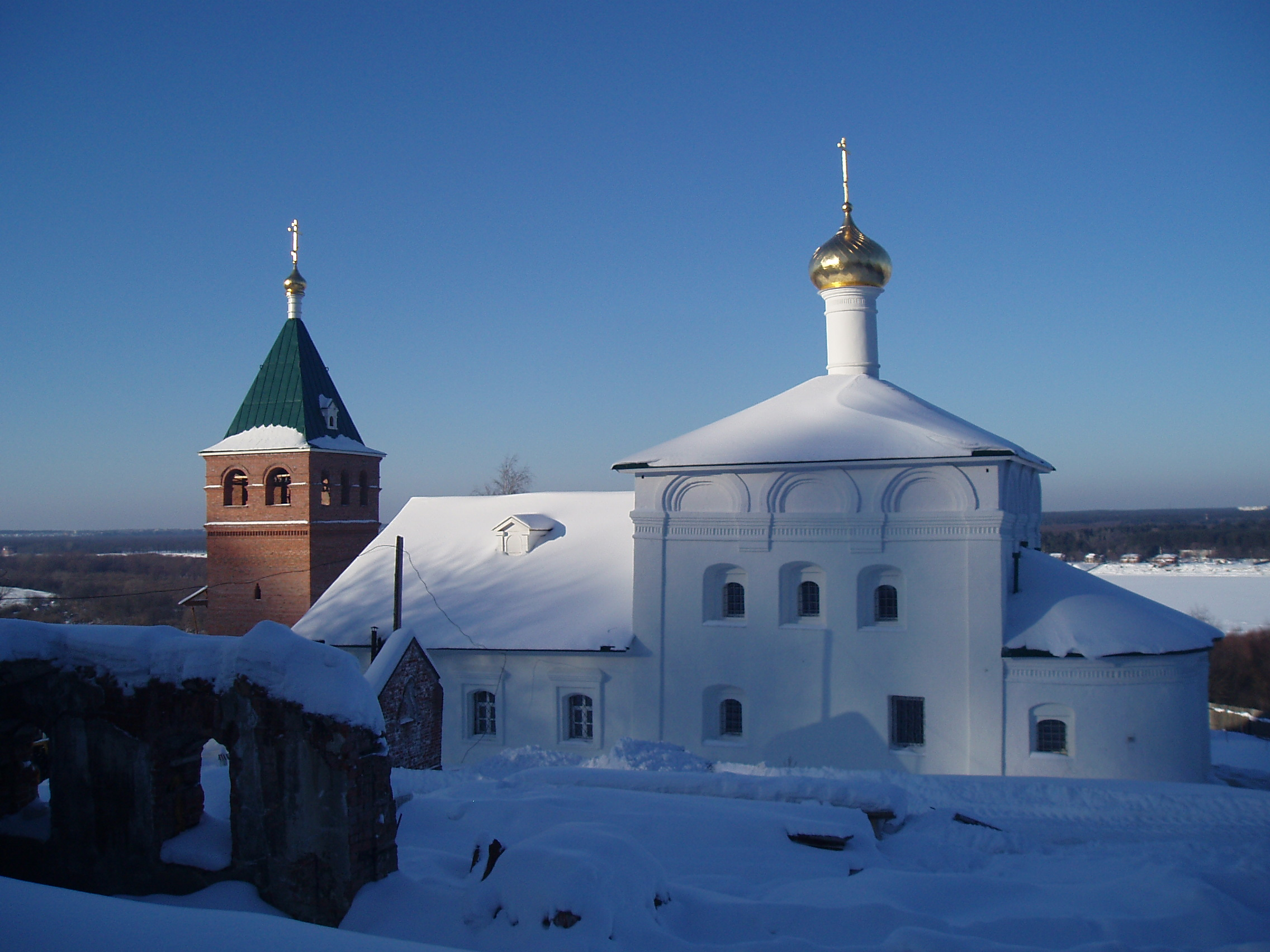 Амвросиев Николаевский Дудин монастырь